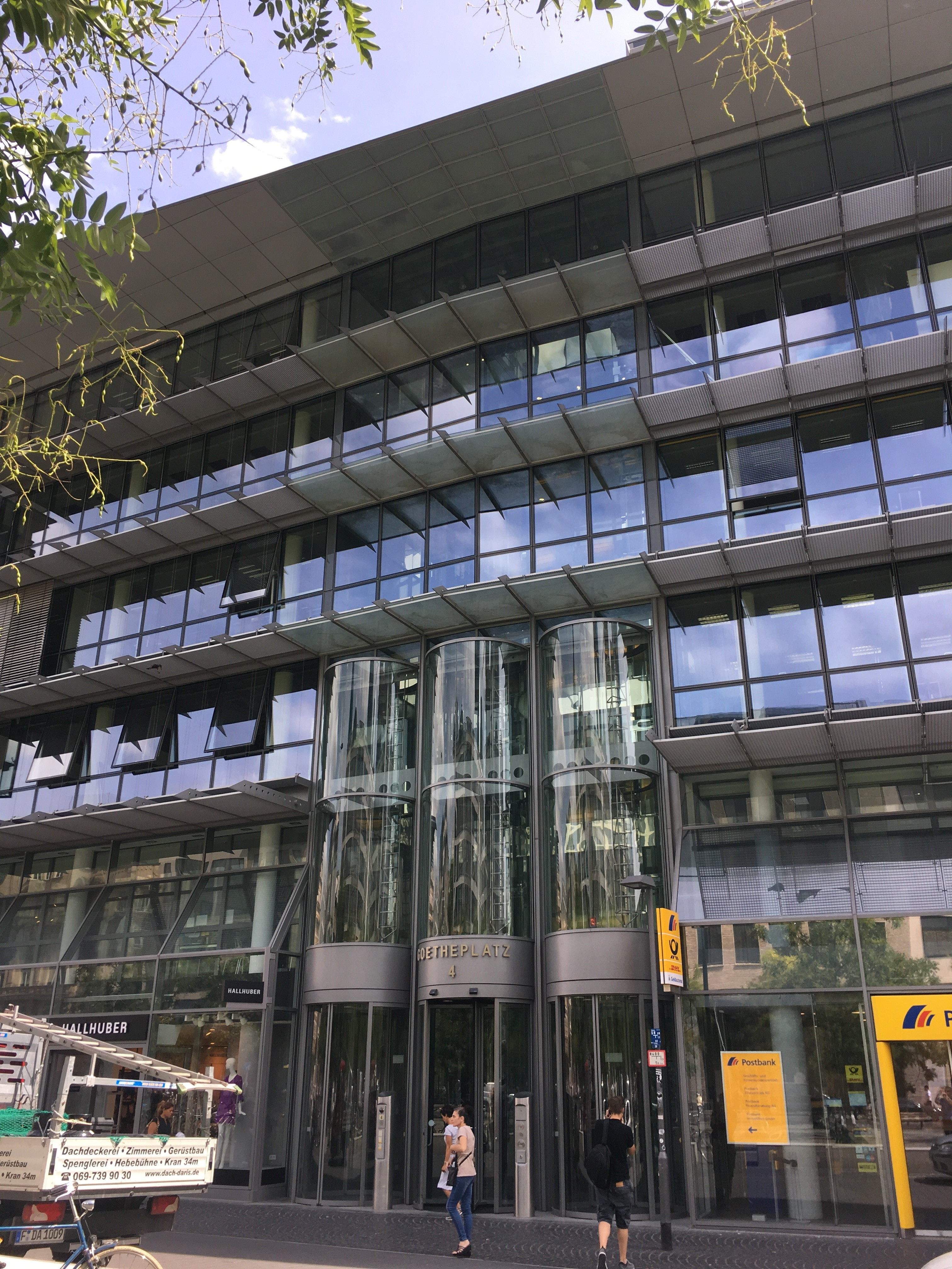 Eurocity Bank in Frankfurt